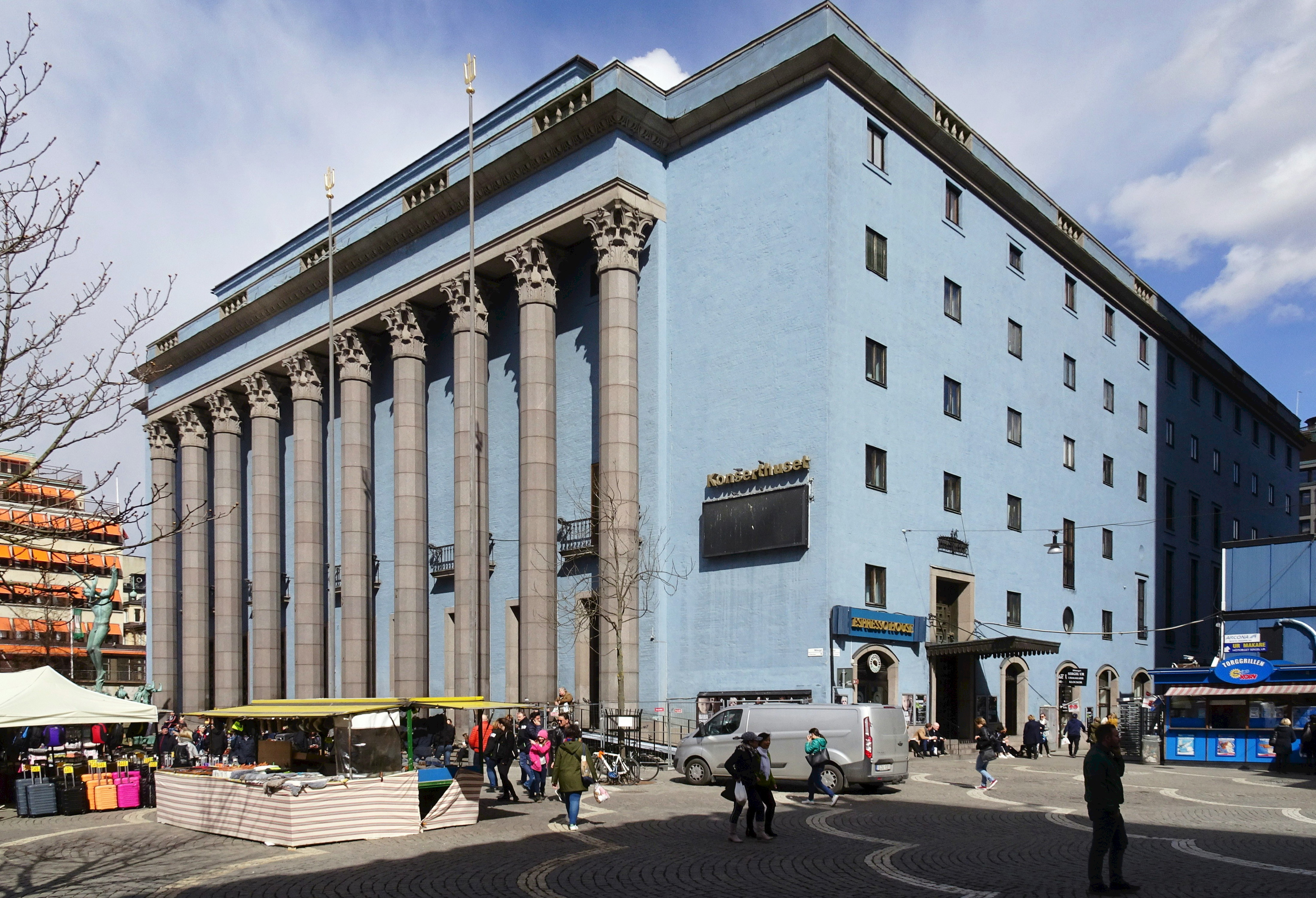 Konserthuset, Stockholm